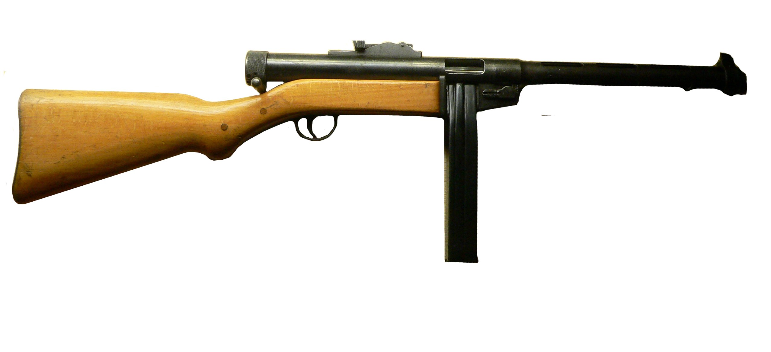 Pistolet-mitrailleur Suomi modèle 1943 armée suisse (MP 43/44) produit par Hispano-Suiza (Suisse) à Genève, musée de Morges.